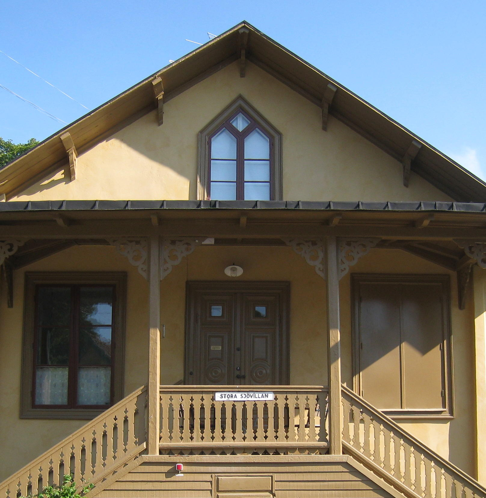 Stora Sjövillan i Äppelviken, Bromma i västra Stockholm, tillhör "Mälarstrandens sommarbebyggelse".